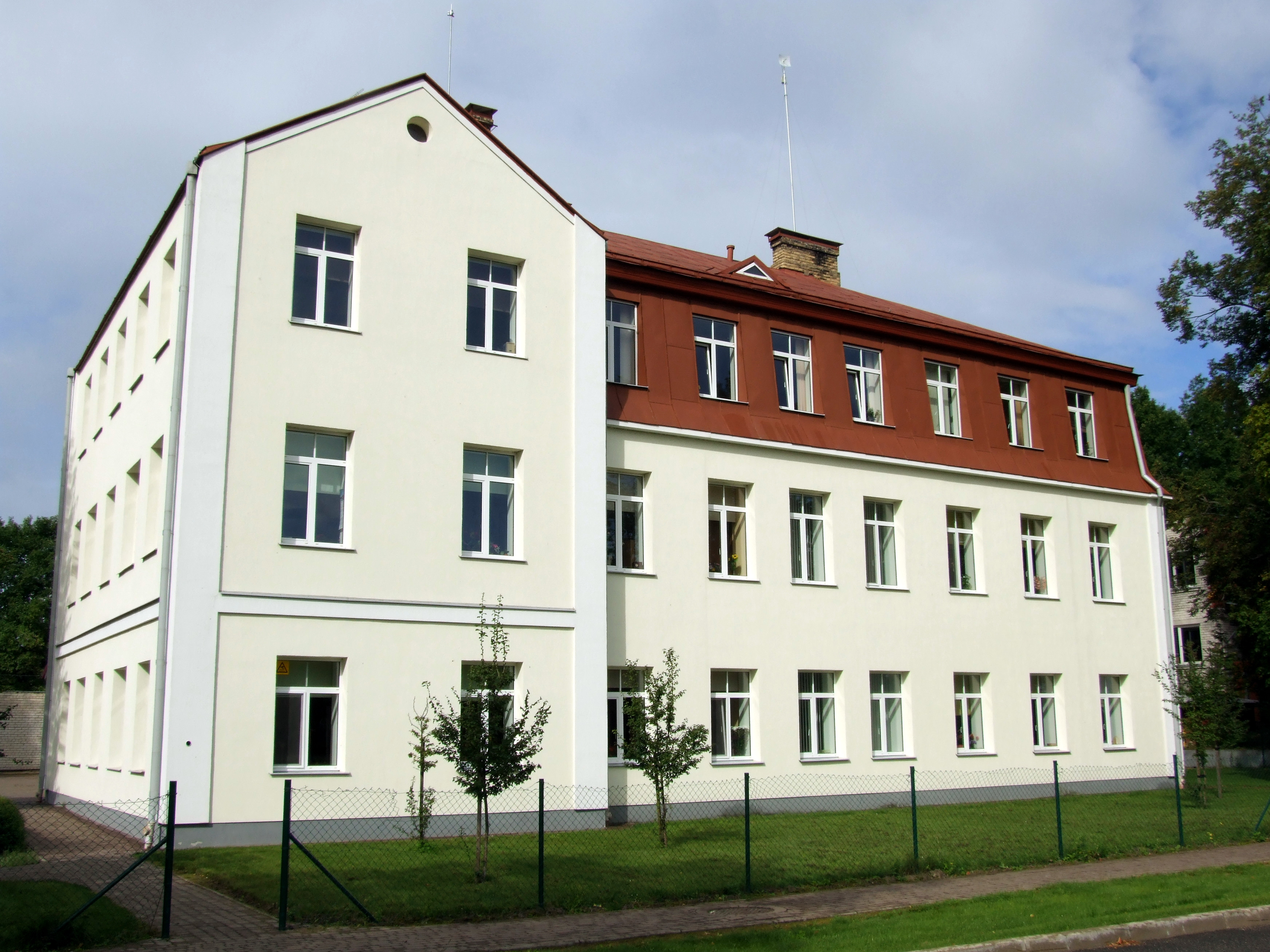 Ozolnieku skola